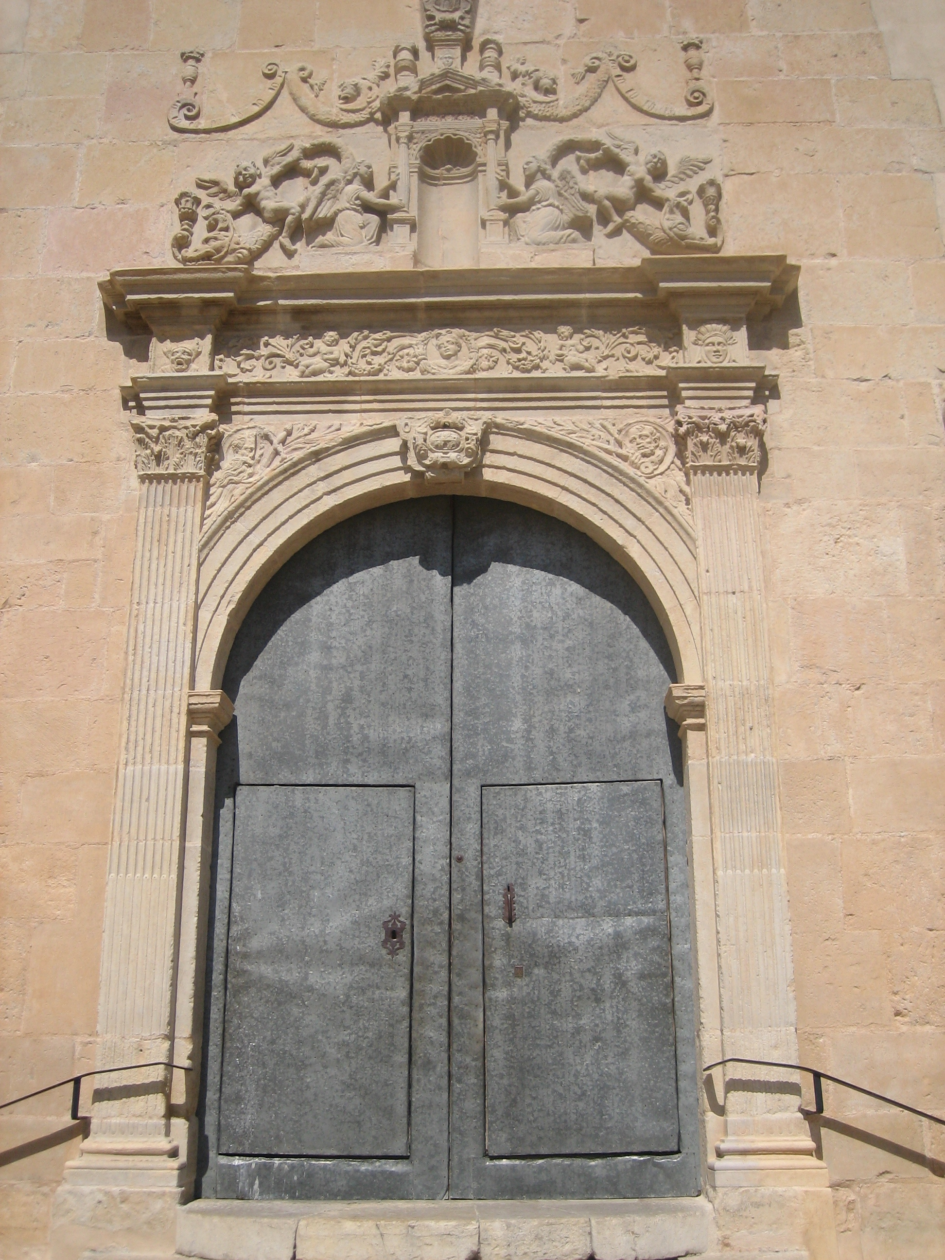 Portada principal de l'església de Santa Maria Magdalena de Vilafranca (Alt Maestrat)